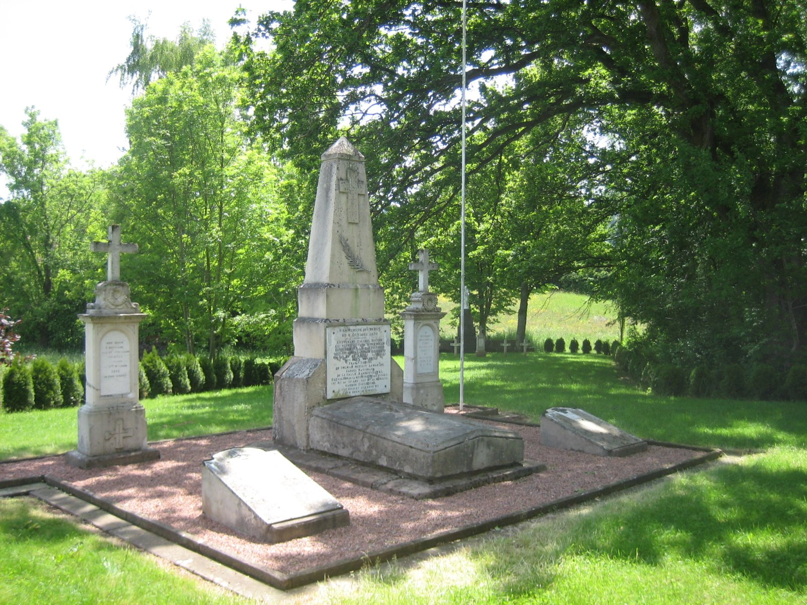 Monument aux morts à Nompatelize (France)